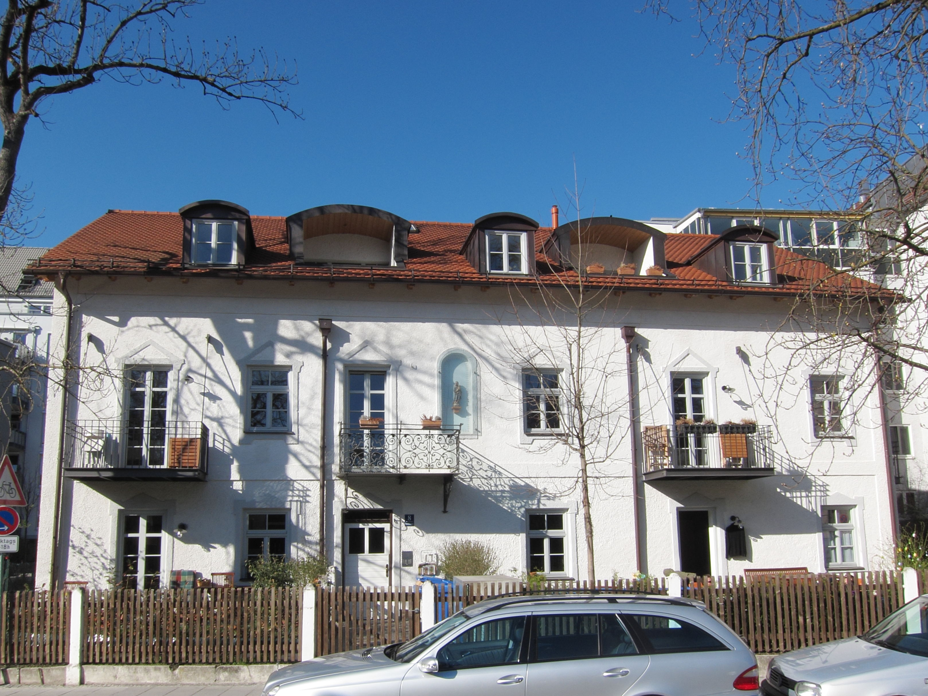 Institutstraße 8; Satteldachhaus, 2. Hälfte 19. Jh.